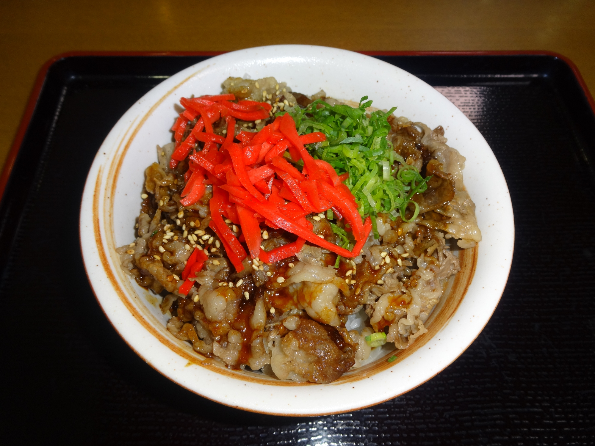 淡路島牛丼（兵庫県淡路市、美湯松帆の郷にて撮影）